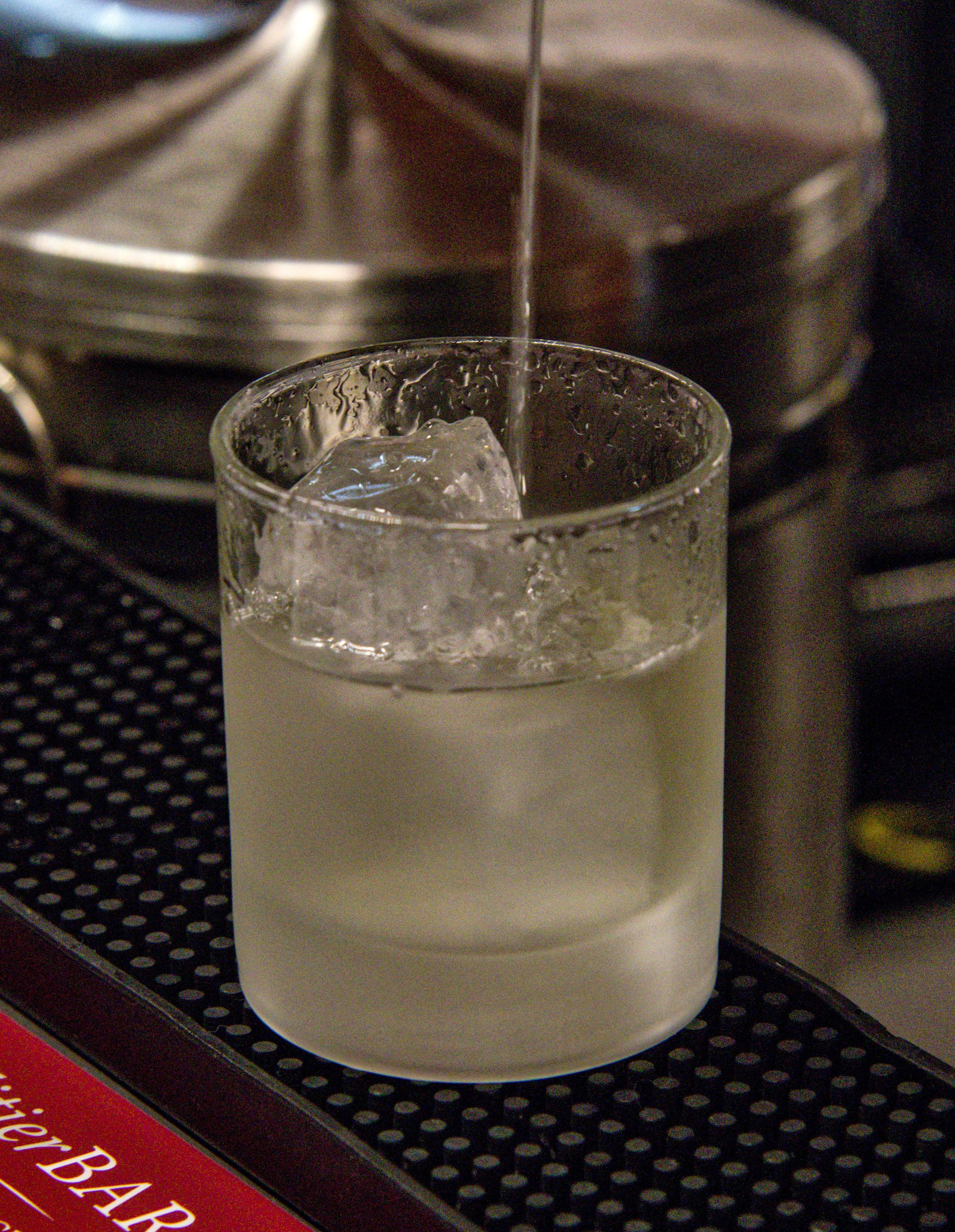 wikicon 2016. Der schönste Ort auf der Veranstaltung - zumindest Abends. Eine Bar Fly